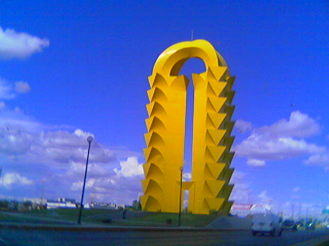 sculpture by Enrique Carbajal González in Durango